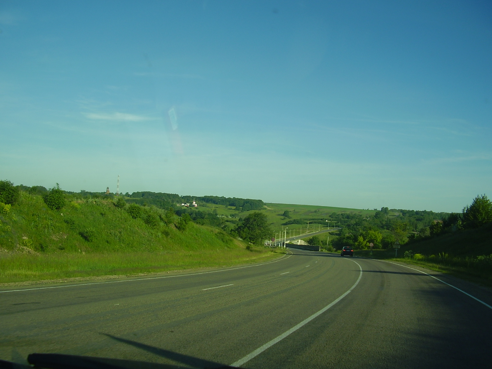 Автодорога Р-141 Лопатково-Ефремов в Тульской оласти